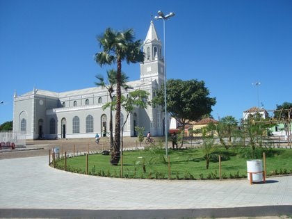 Igreja Santo Antonio, Igreja de Campo Maior/Piaui